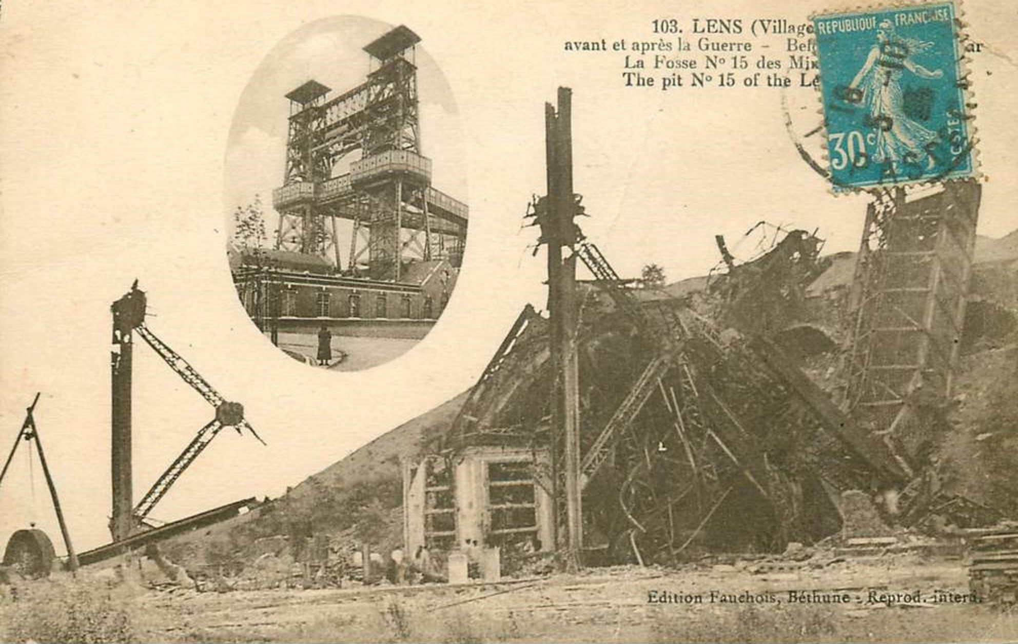 Fosse n° 15 - 15 bis Saint Maurice ou Maurice Tilloy détruite pendant la Première Guerre mondiale, Compagnie des mines de Lens, Loos-en-Gohelle, Pas-de-Calais, France.